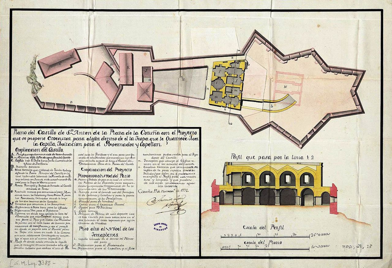 Plano del Castillo de S. Antón de la Plaza de la Coruña